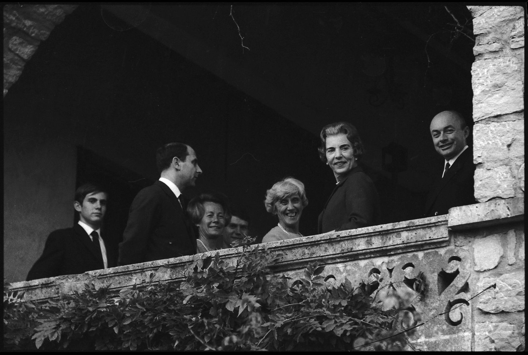 Albas (Lot). 2 Novembre 1966. Vue de la reine du Danemark sur un balcon à Albas.